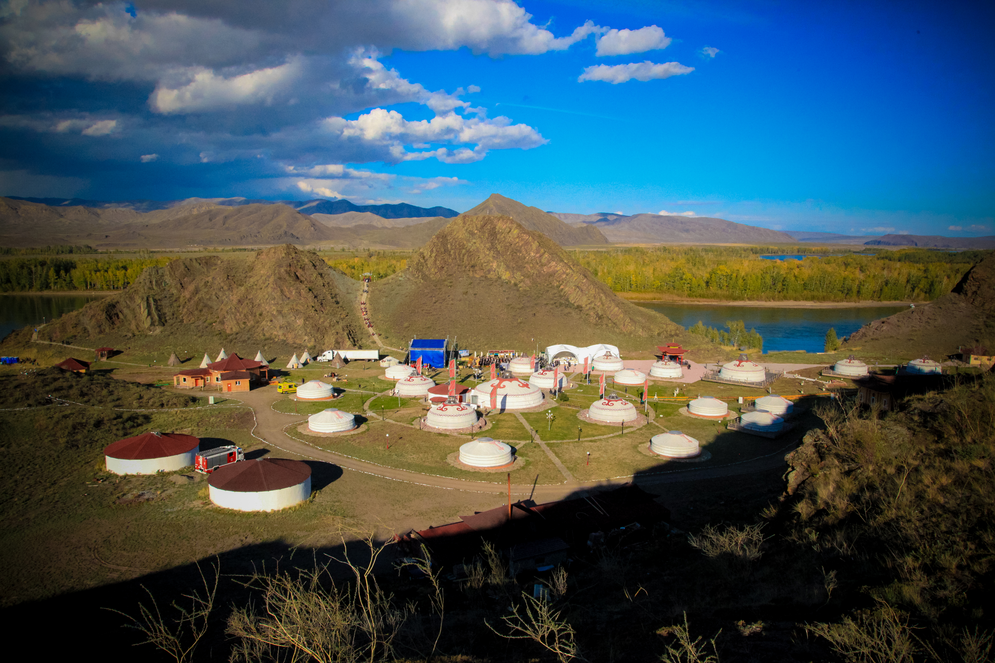 Юрточный городок "Алдын-Булак" (золотая стрела)